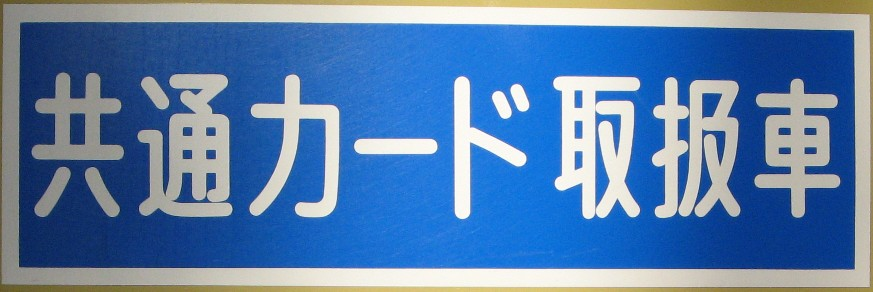 バス共通カード、マリンカードが使えるバス車両側面に貼られる「共通カード取扱車」ステッカー